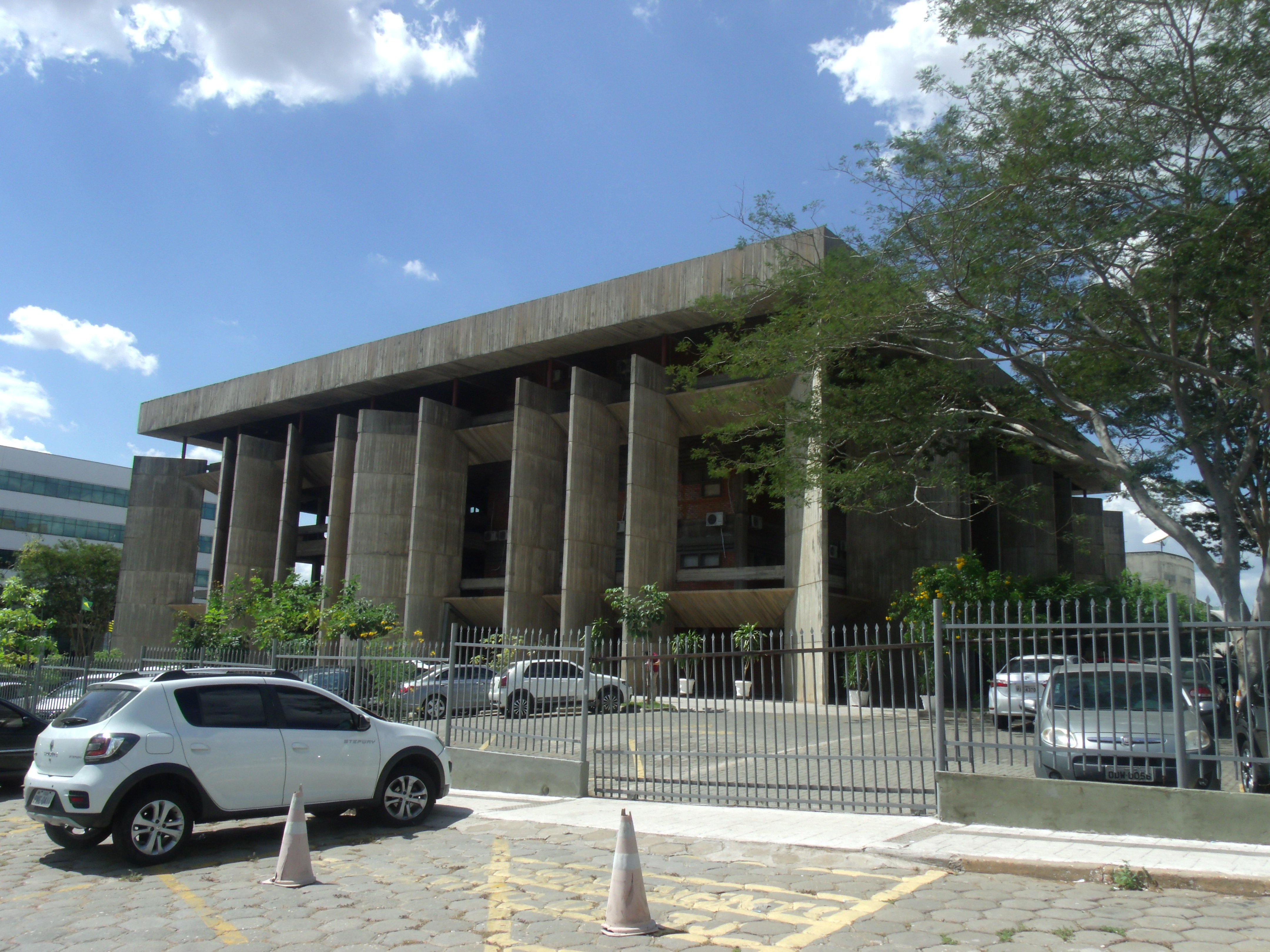 Vista lateral do palácio do tribunal de Justiça do Piauí.